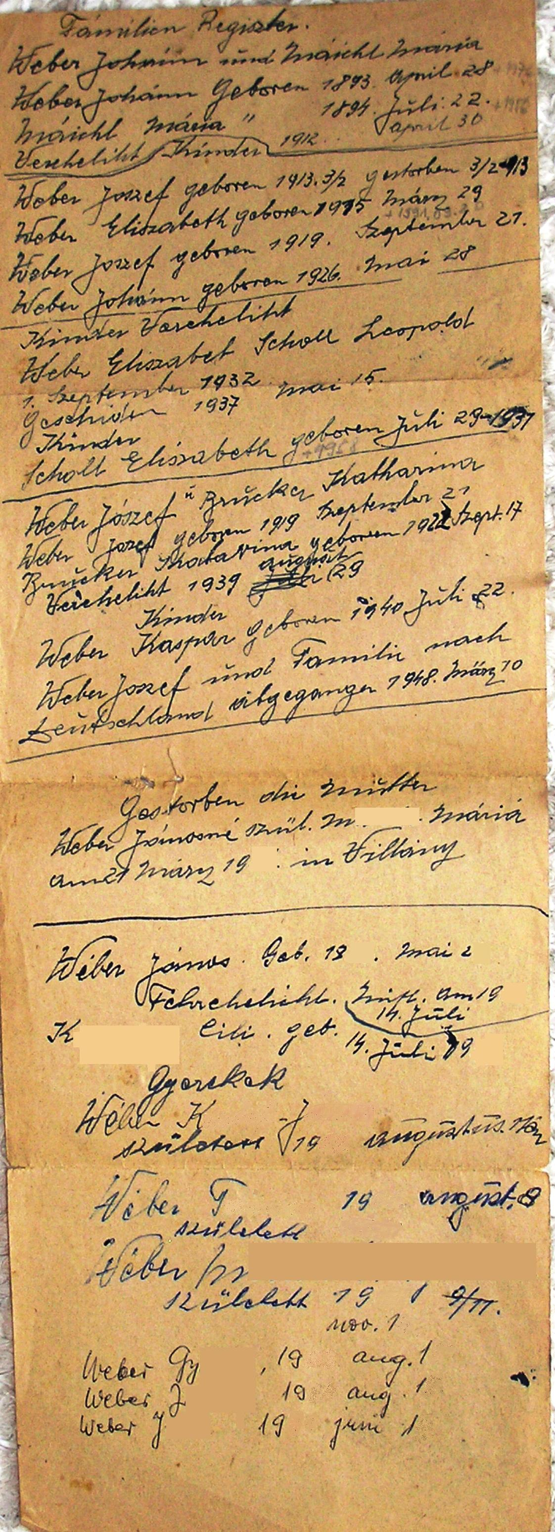 A kép egy a családi hagyatékban talált megsárgult papírlapot ábrázol, melyre talán az 1970-es években a tulajdonosa felírta a családja tagjait. Az adatrögzítő nem tudott helyesen magyarul, s biztosan elmúlt 75 éves az íráskor.